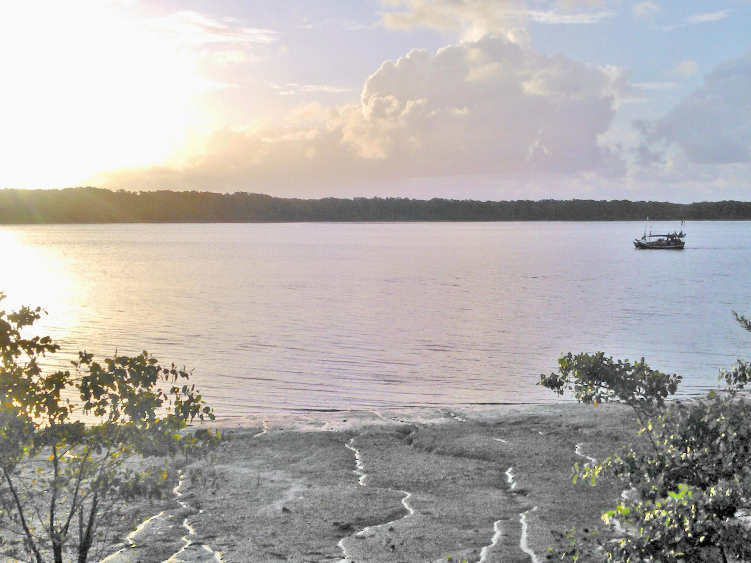 Final da tarde as margens do rio em Curuçá-PA